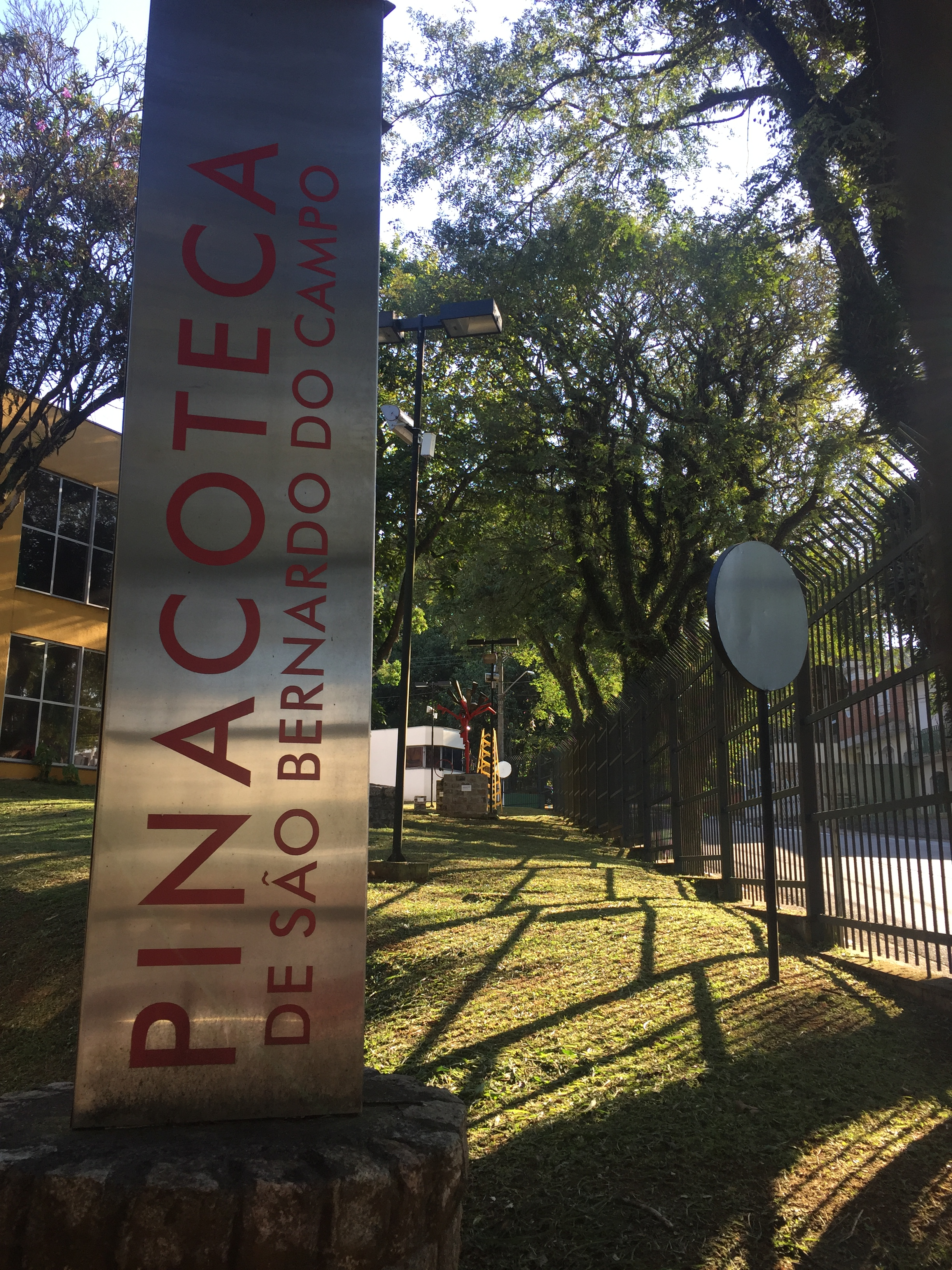 Placa com nome da Pinacoteca de São Bernardo do Campo, na entrada.